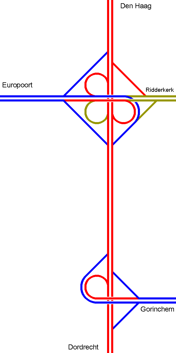 Knooppunt Ridderkerk omstreeks 1979